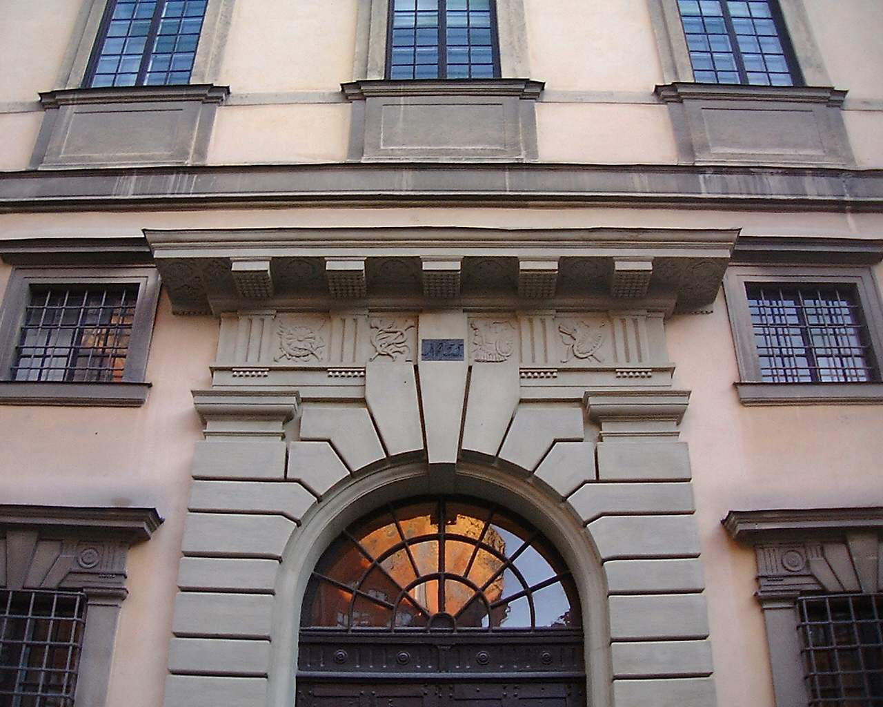 Södra Bankhuset in February 2007.